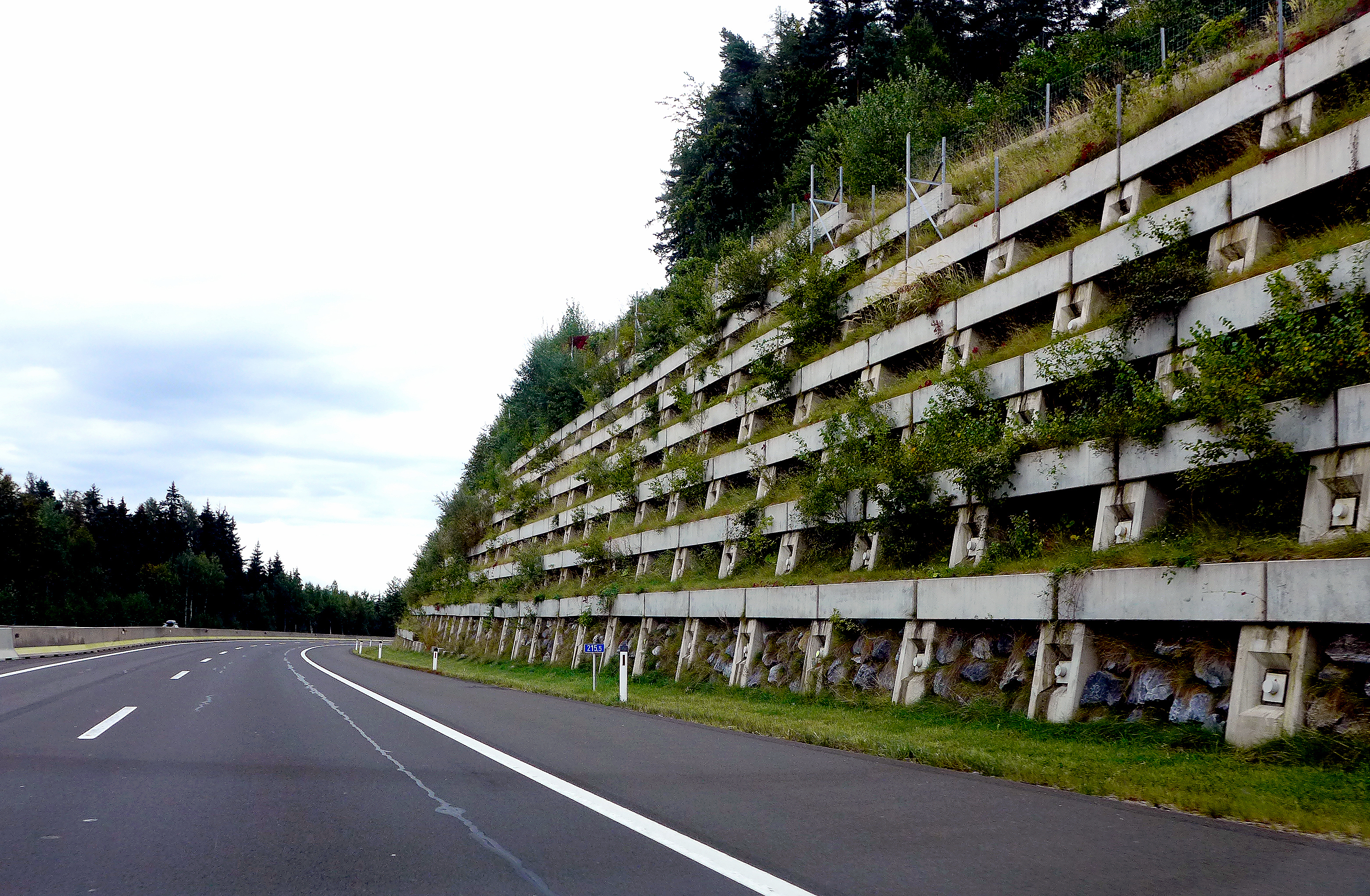 Packsattel–Modriach-szakasz, sziklabevágás és megerősítése (A2-es autópálya, Ausztria)